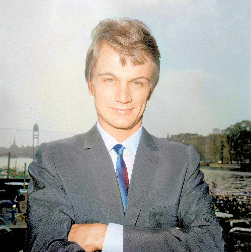 Claude François en 1965 à Amsterdam (colorisé).